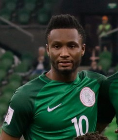 Nigeria national football team